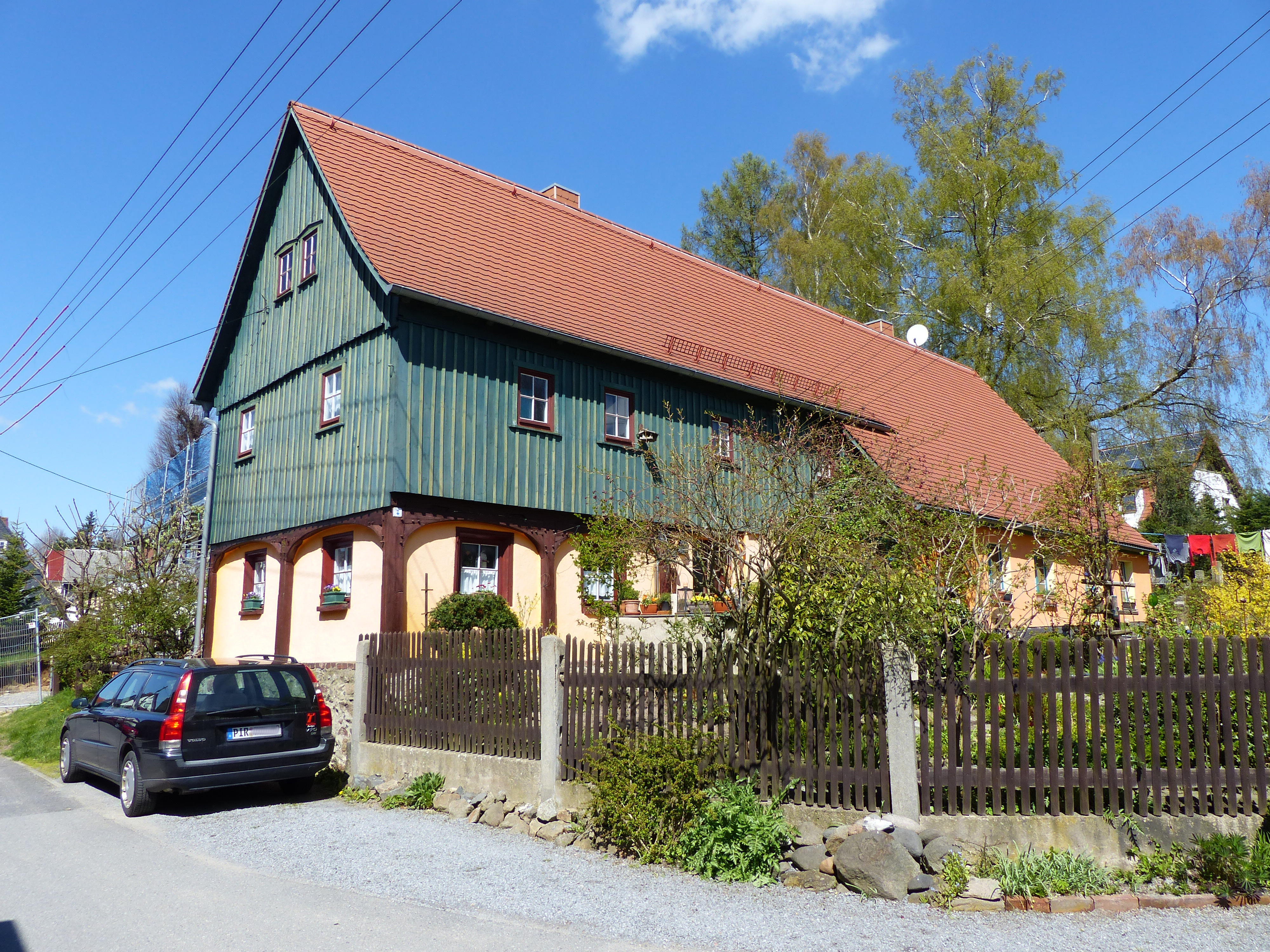 Denkmalgeschütztes Umgebindehaus, Alter Weg 17a, Niederottendorf (Neustadt in Sachsen)